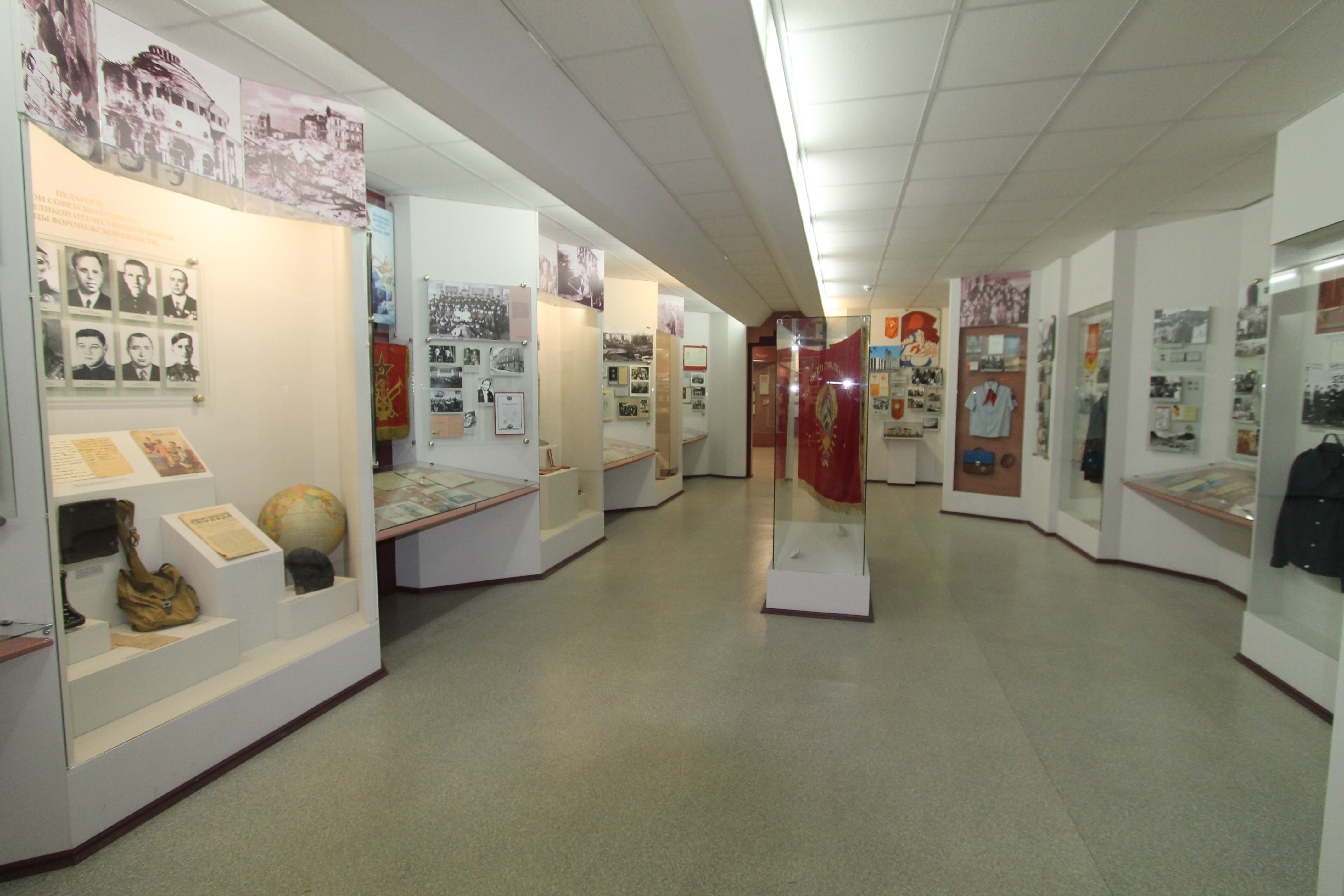 Экспозиция зала 4